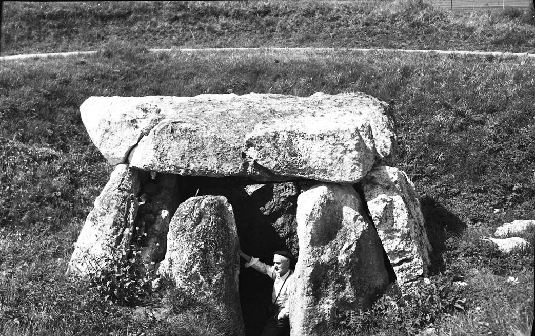 Aizkomendiko trikuharria. Egilatz (Araba).